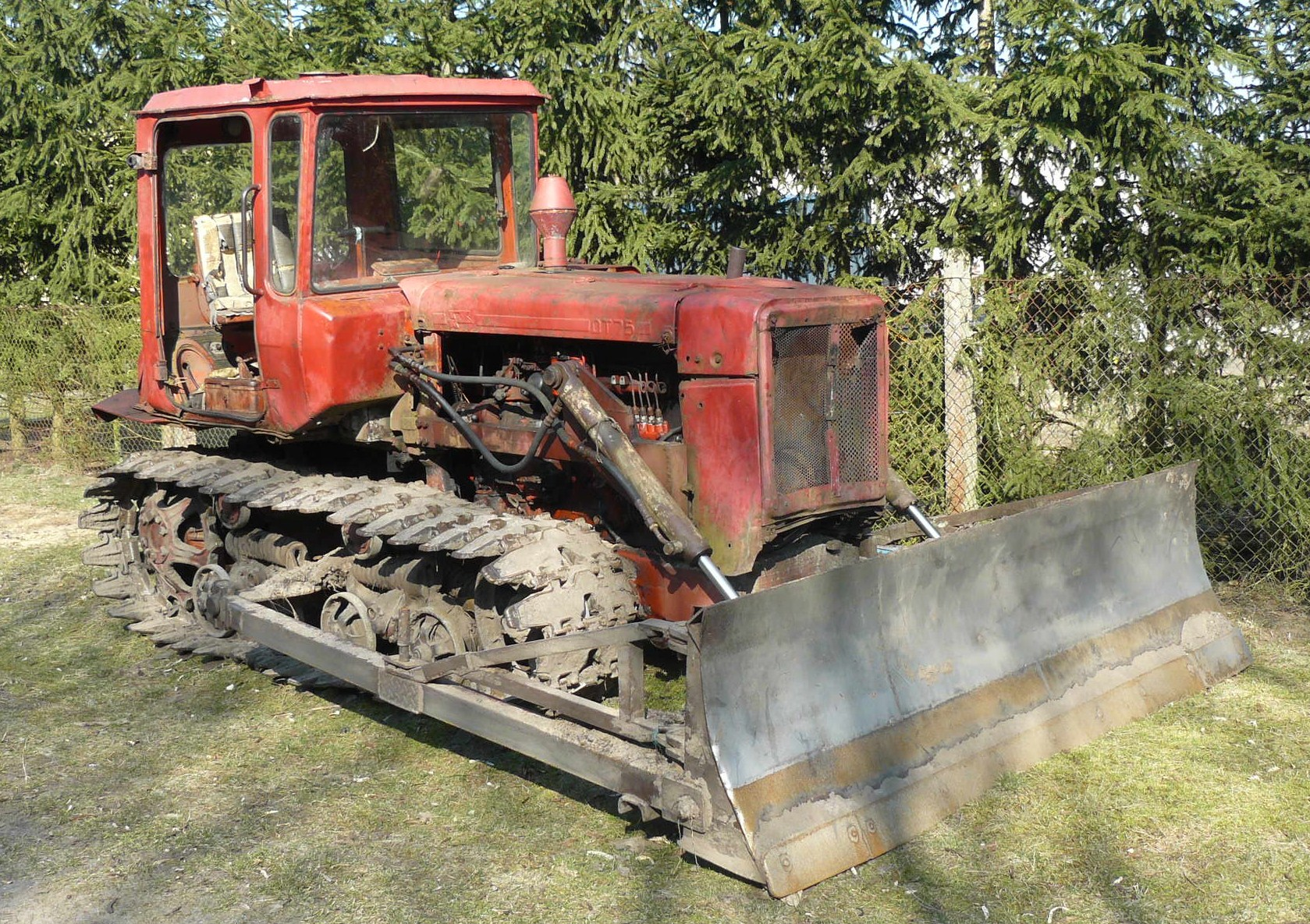 Zawada Rybakówka koło Drawskiego Młyna w Puszczy Noteckiej. DT-75 (radziecki traktor).